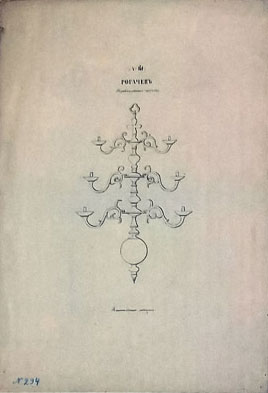 Беларуская (тарашкевіца): Рагачоў (Rahačoŭ). Царква Сьвятых Казьмы і Дзям'яна. Рэліквія